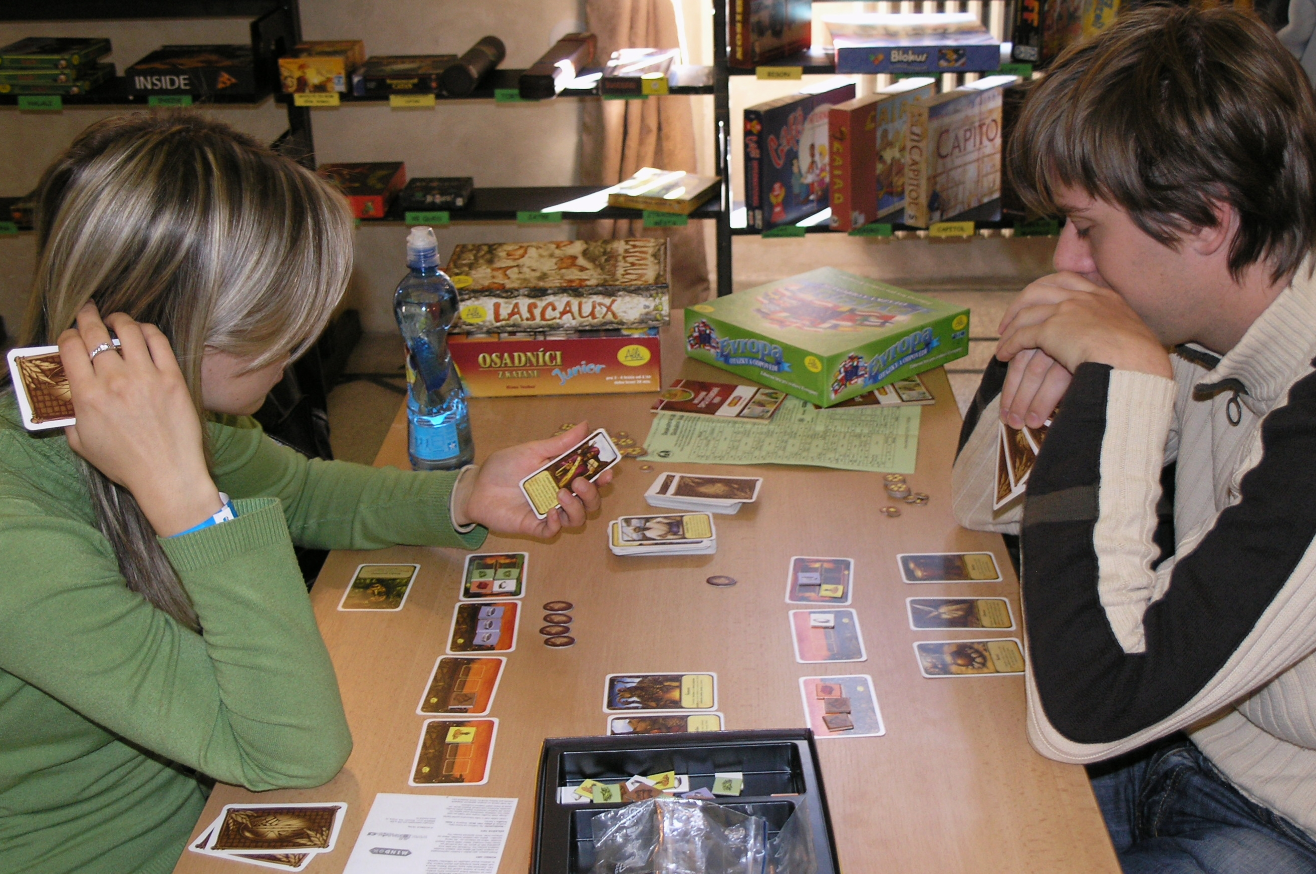 Deskohraní 2008